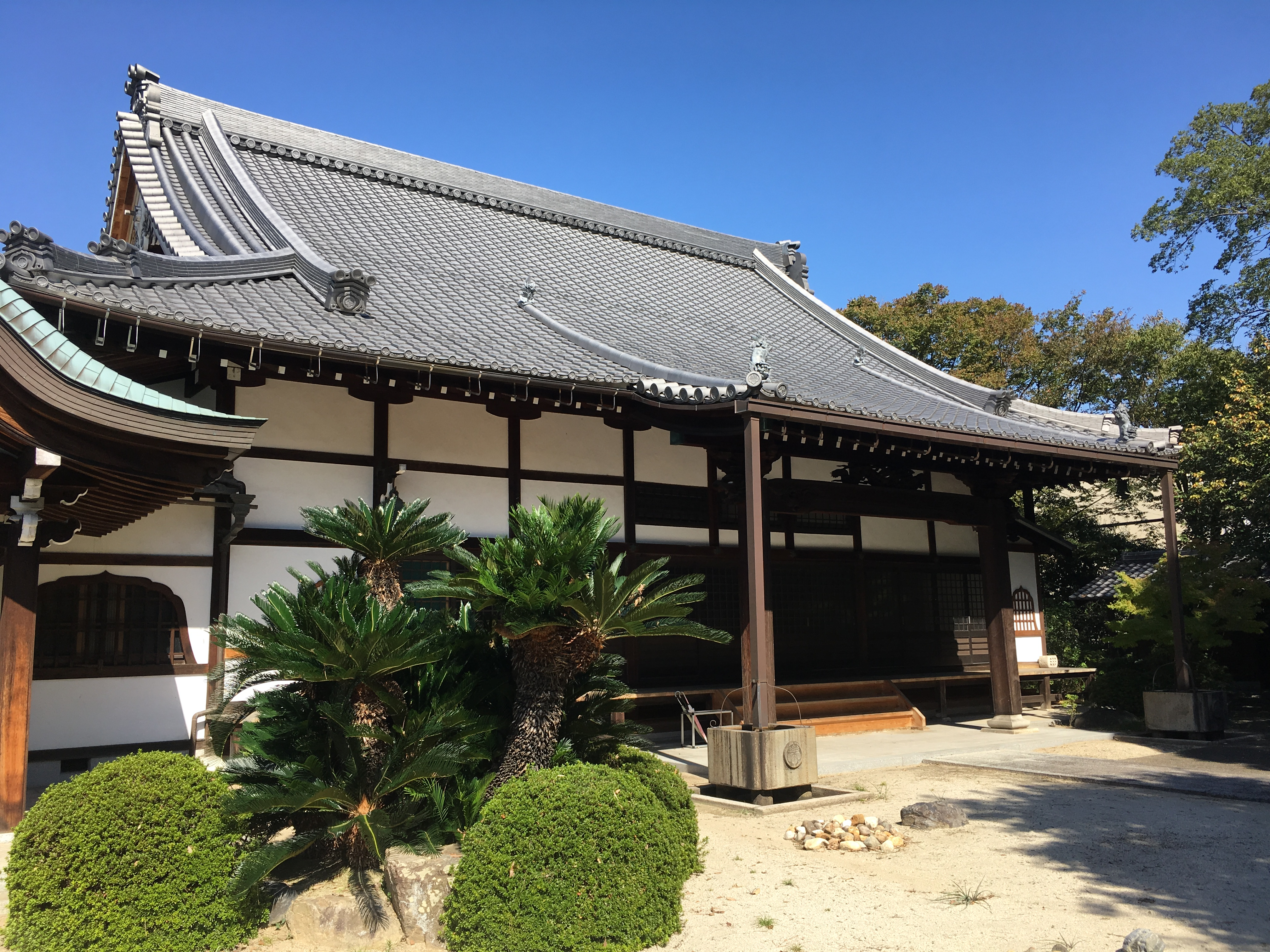 太清寺の本堂